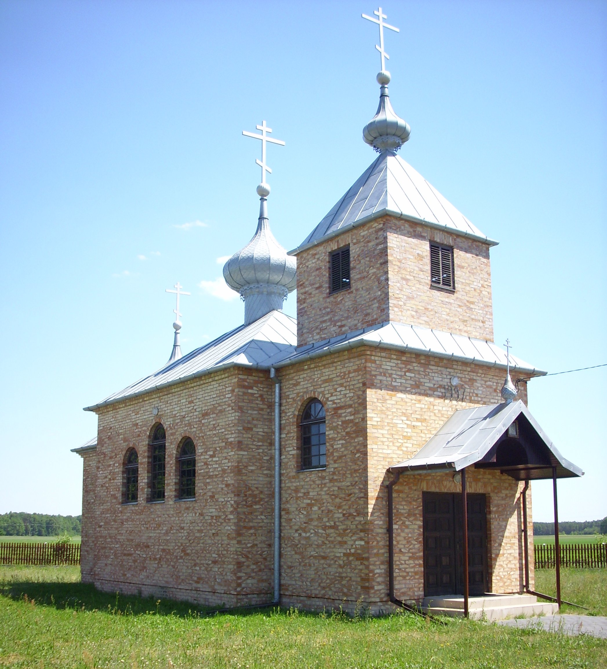 Janówka (powiat włodawski). Cerkiew wzniesiona w latach 1997…2001.